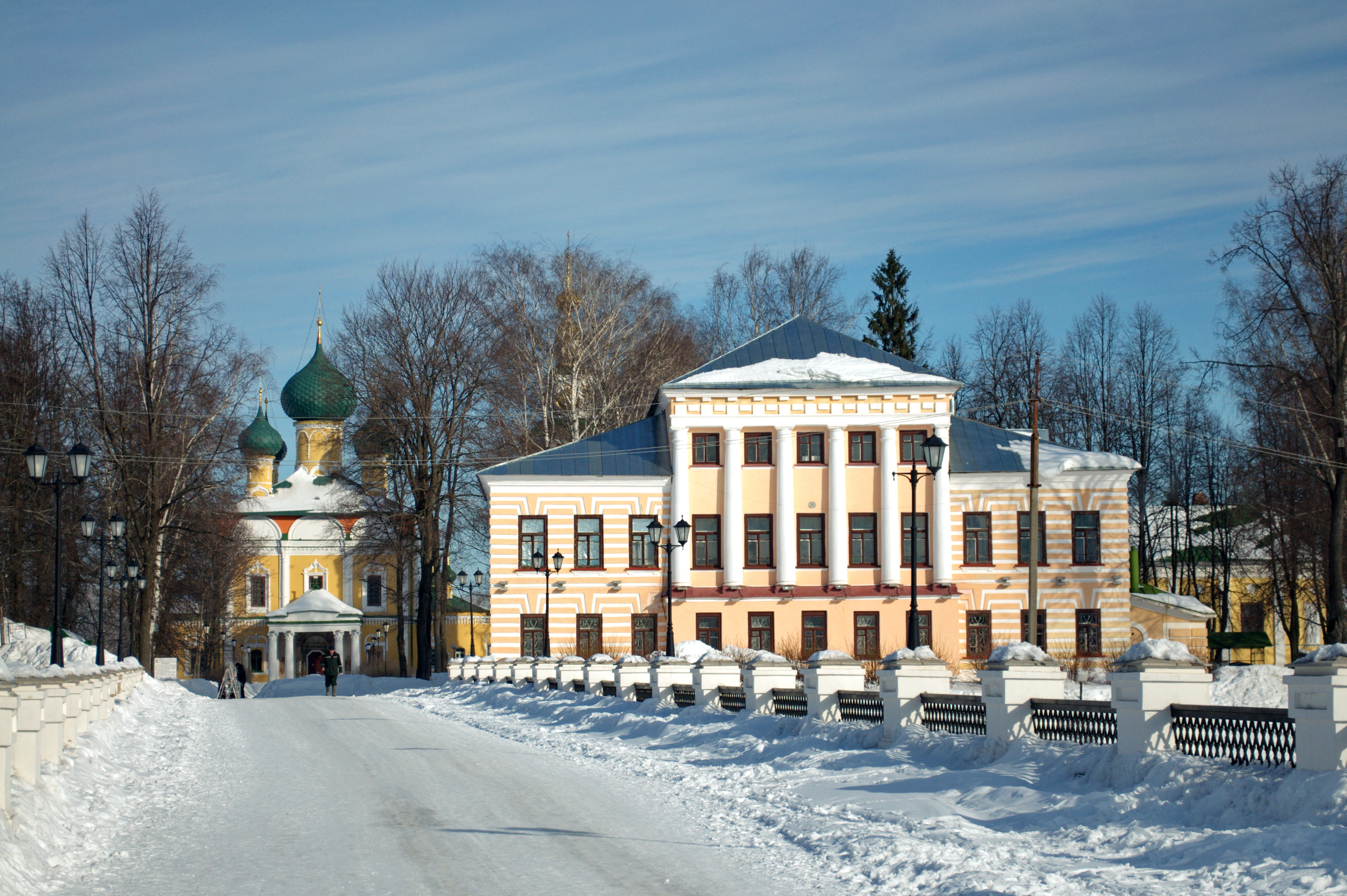 Угличский историко-художественный музей (музейный комплекс) (Ярославская область, Углич, город Углич)